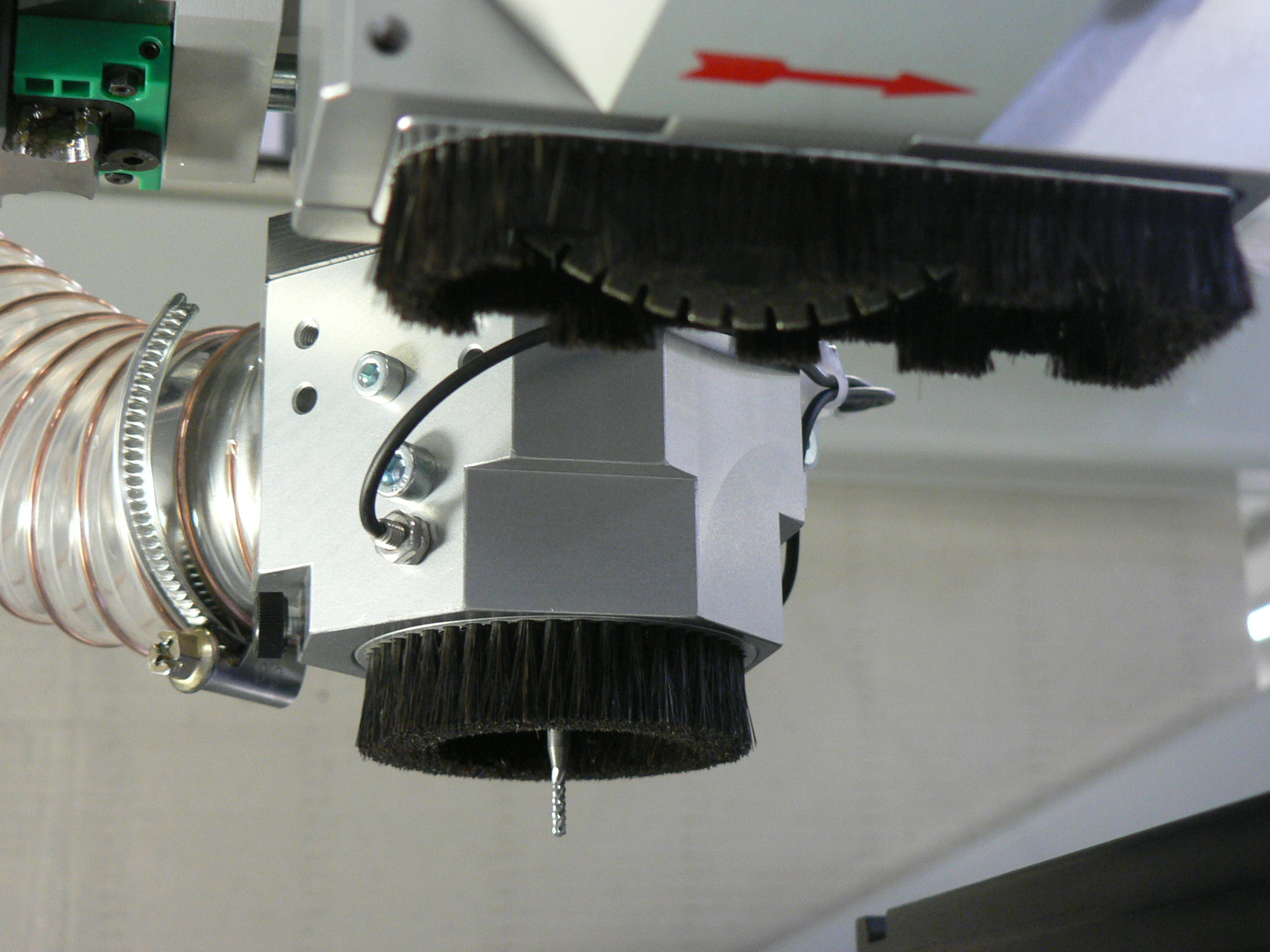 Säge- und Fräsmodul eines TOF-Routers der Firma IPTE